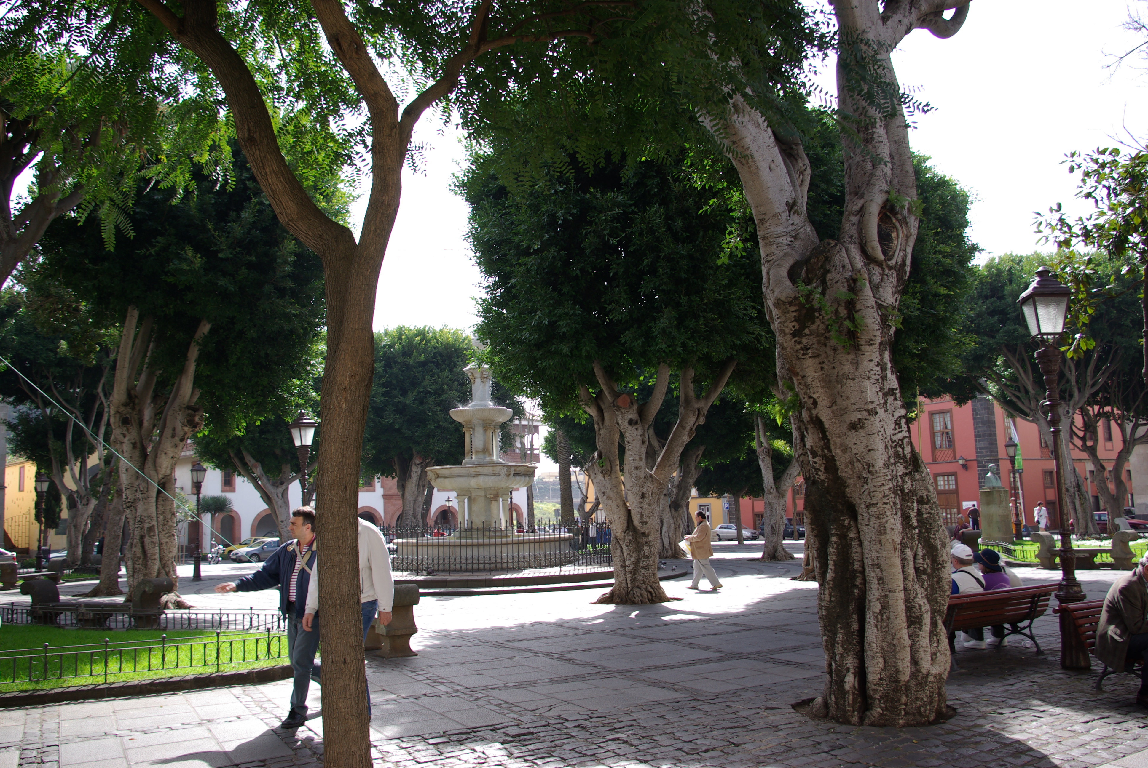 Teneriffa, La Laguna, Plaza del Adelantado